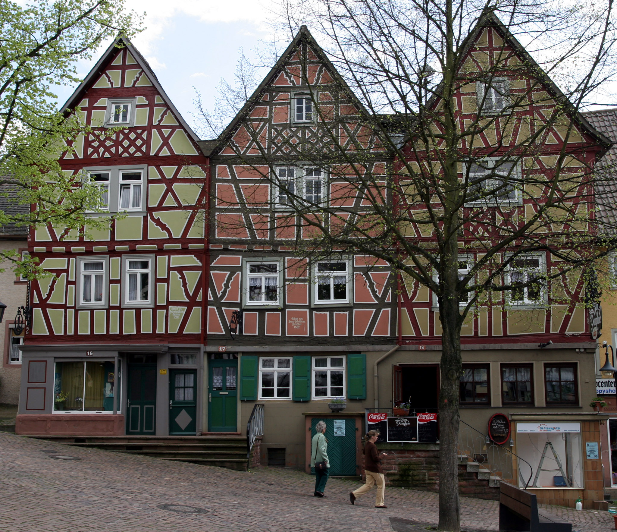 Die unter Denkmalschutz stehenden Haus Nr. 16, 17 und 18 am "Marktplatz" in der Stadt Bensheim This is a picture of the hessian Kulturdenkmal (cultural monument) with the ID 509